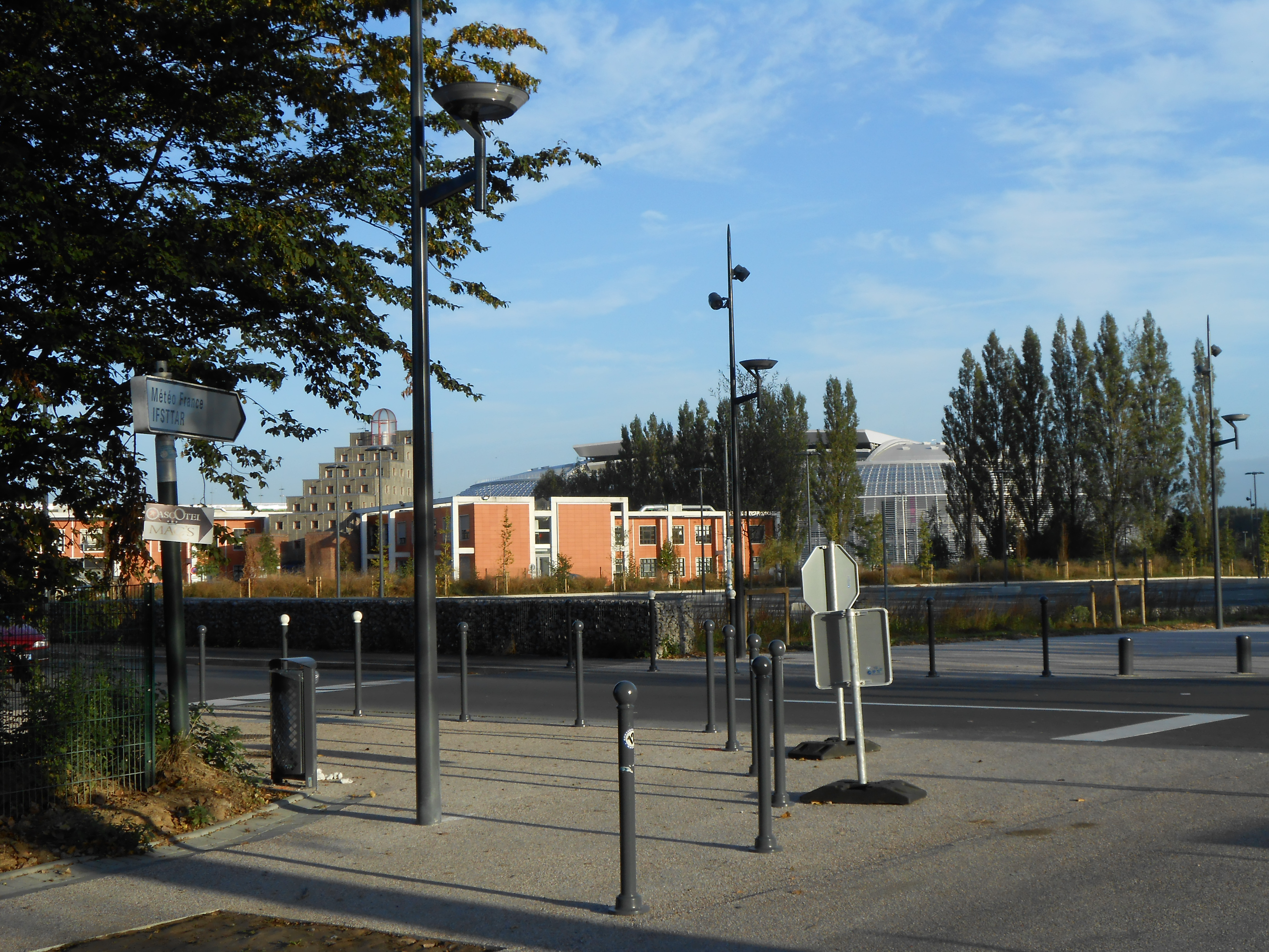 Cité scientifique, Croisement entre avenue Paul Langevin et rue Élisée-Reclus - École centrale de Lille, parc d'innovation de la Haute Borne, accès Météo France et IFSTTAR IFSTTAR Lille-Villeneuve-d'Ascq (ESTAS : Évaluation des Systèmes de Transports Automatisés et de leur Sécurité, LEOST : Laboratoire Électronique Ondes et Signaux pour les Transports) 20,rue Élisée-Reclus F-59666 Villeneuve d'Ascq France Météo France direction interrégionale Nord, 18, rue Elisée-Reclus, F-59651 Villeneuve d'Ascq Campus Lille I - Université Lille Nord de France